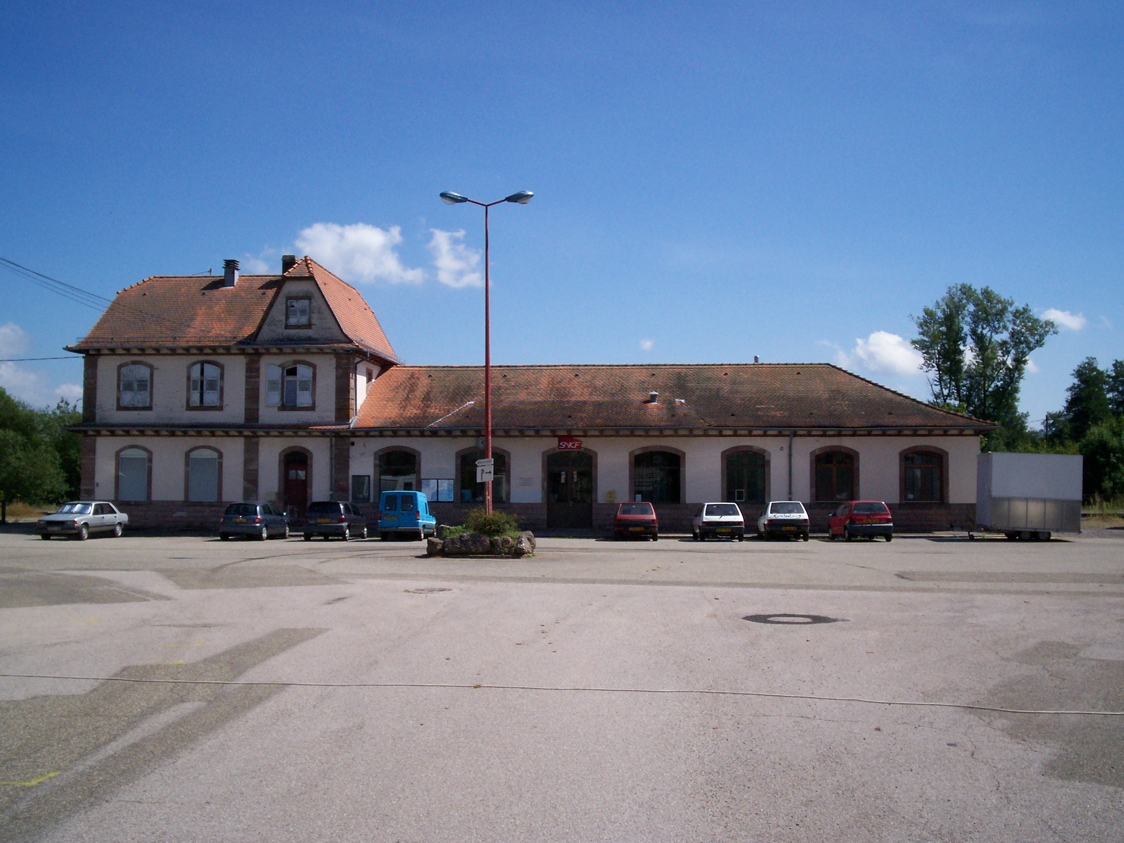 Bâtiment Voyageurs de Saales